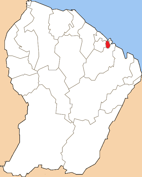 Situation du canton dans le département de la Guyane